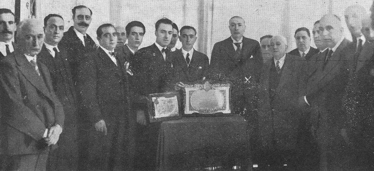 Homenaxe en Celanova a Manuel Lezón, fotografía en Vida Gallega 1932